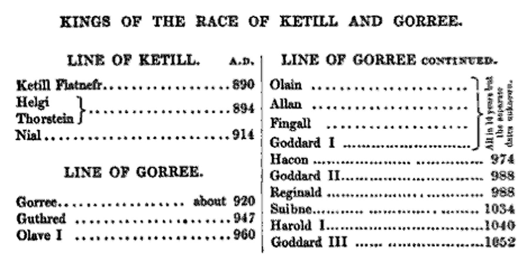 Norse line of Manks kings (890 – 1052)